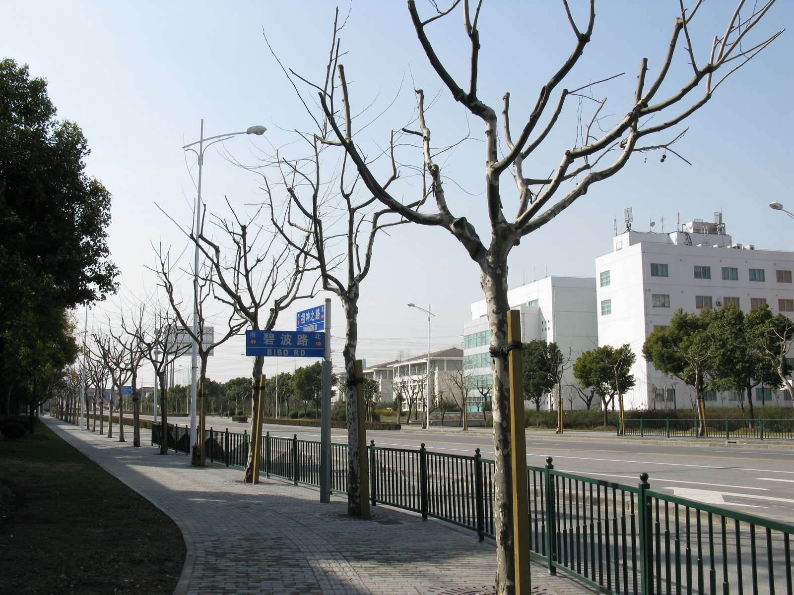 上海张江高科技园区 祖冲之路 Zuchongzhi Road, Shanghai Zhangjiang Hi-Tech Park